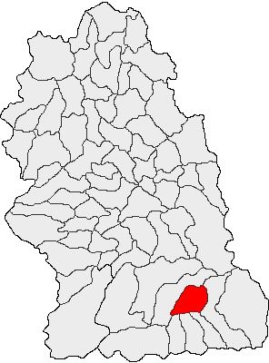 Categorie:Hărţi ale judeţului Hunedoara